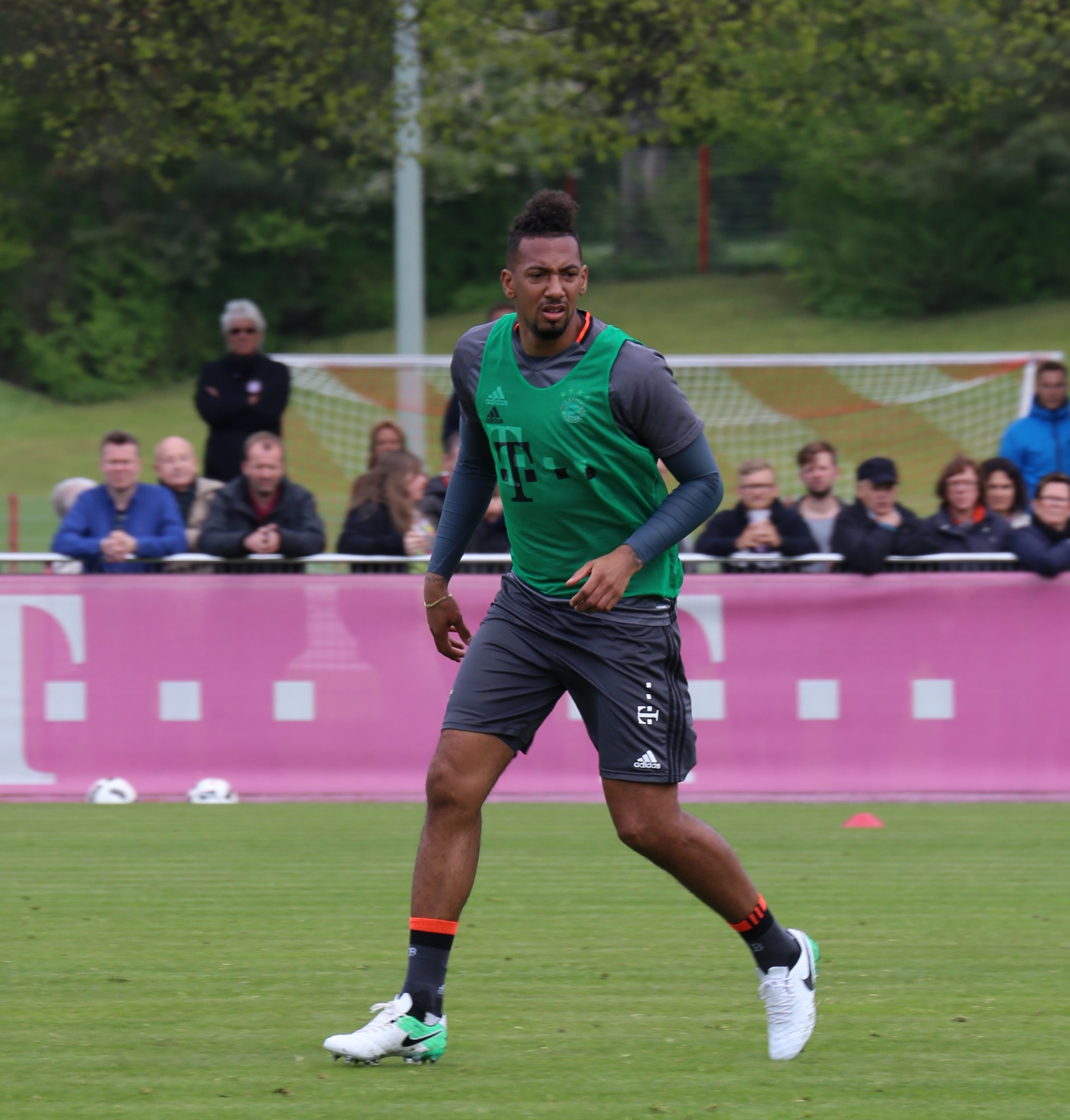 Jérôme Boateng, am 3. Mai 2017 beim Training auf dem Gelände des FC Bayern München